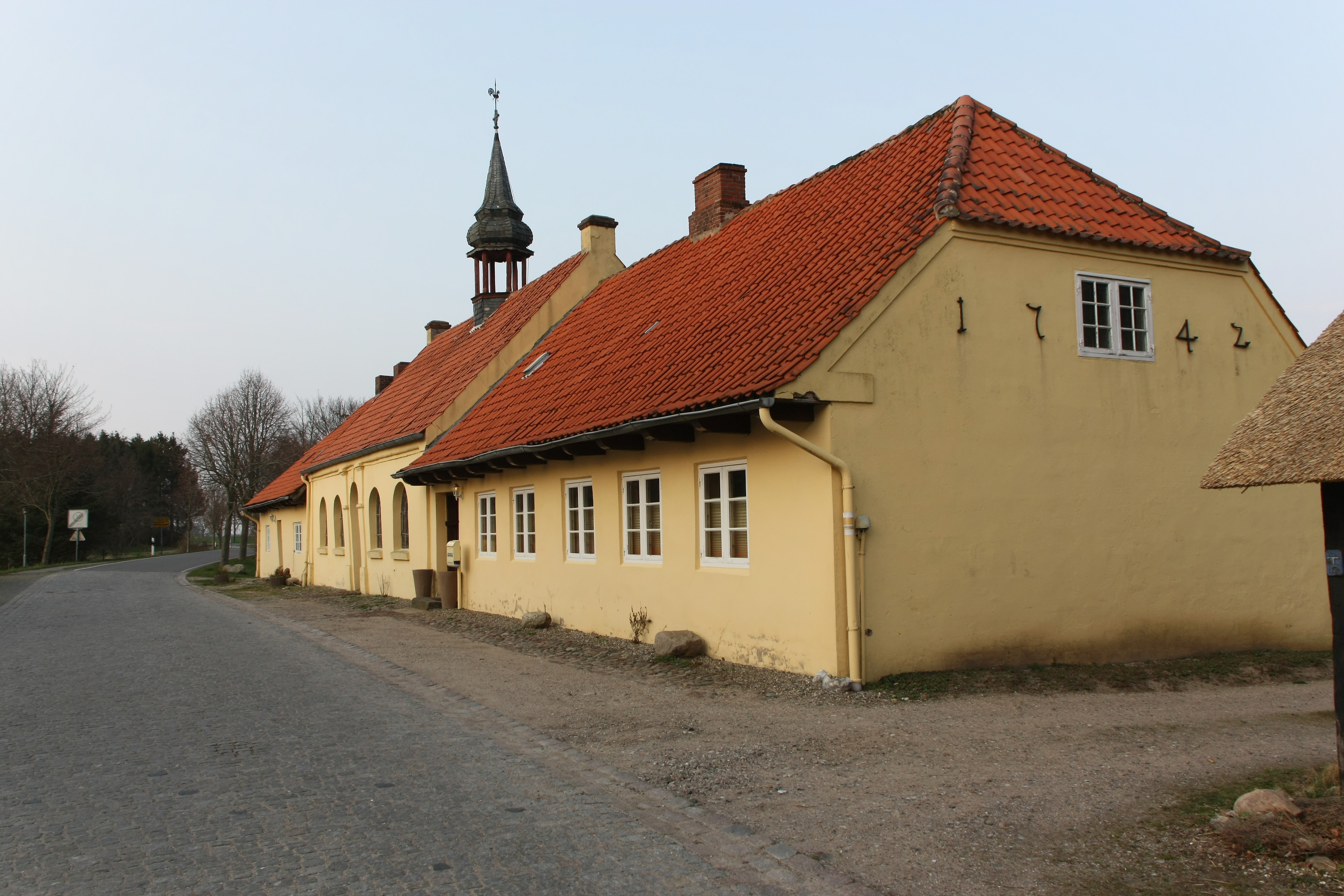 Sankt Johannes-Stift Damp This is the photograph of an architectural monument. It is part of the list of cultural monuments of Damp